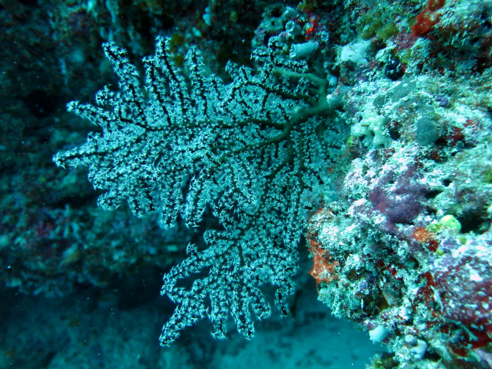 Une colonie de corail du genre Siphonogorgia aux Maldives (atoll de Baa).